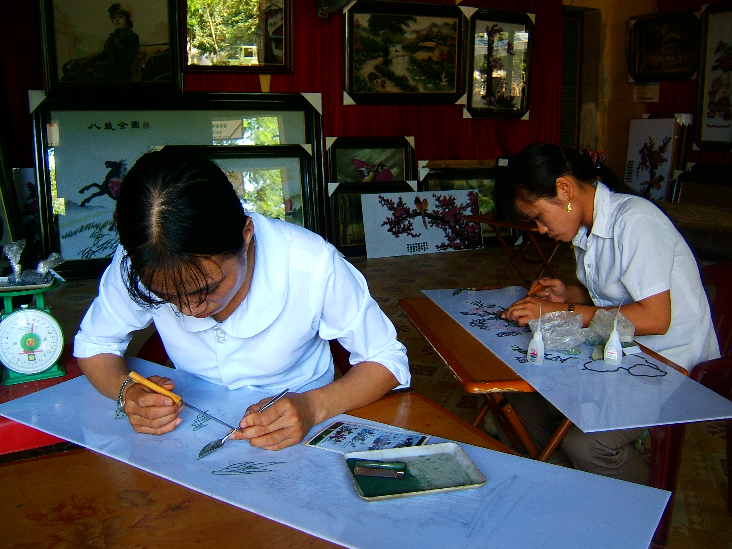 Làm tranh bằng đá quý tại Lục Yên, Yên Bái